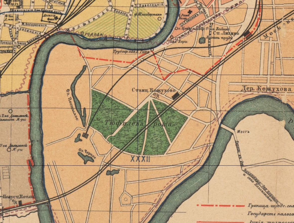 Тюфелева роща на карте 1915 года издания Суворина.